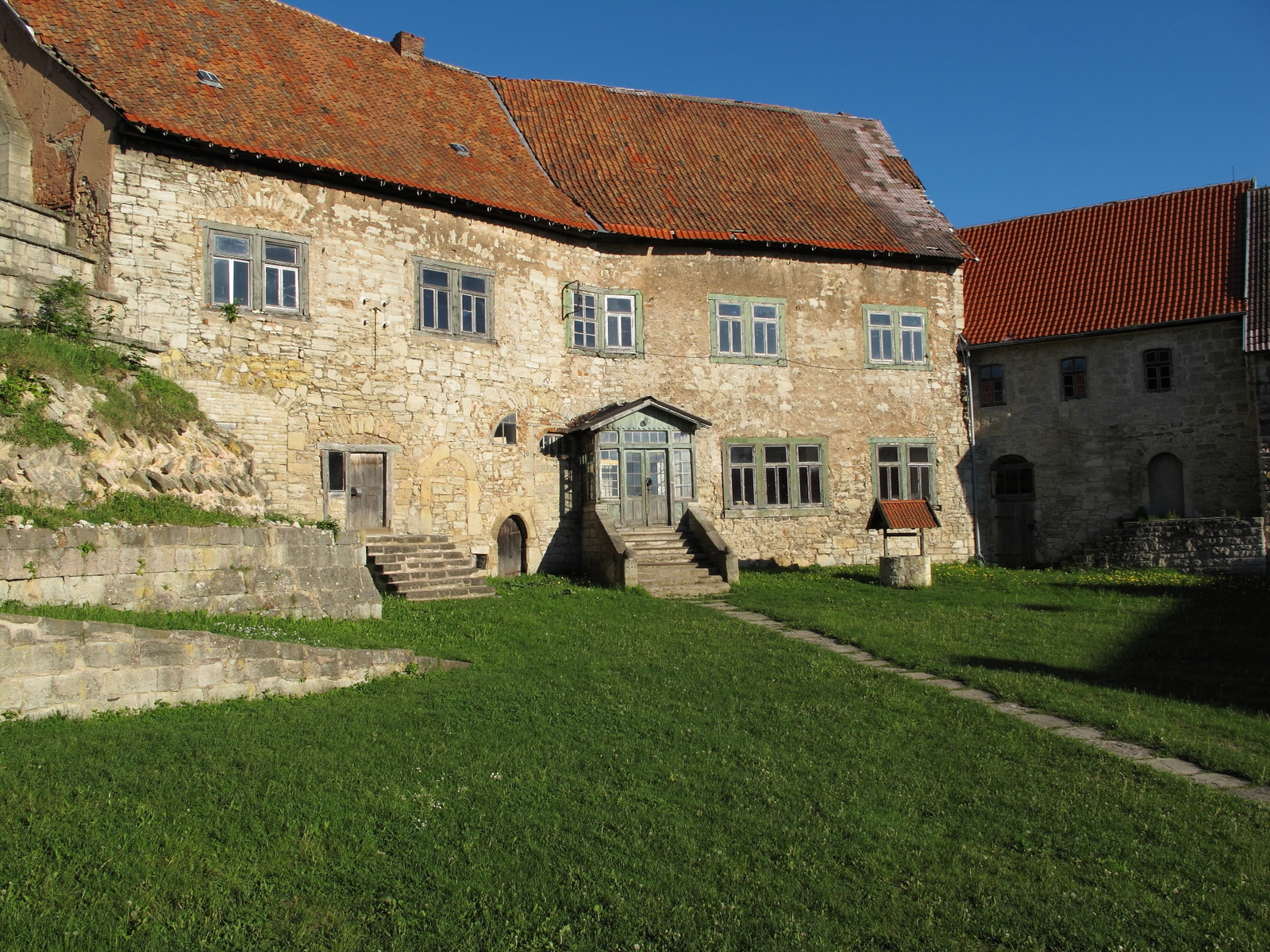 Burghof